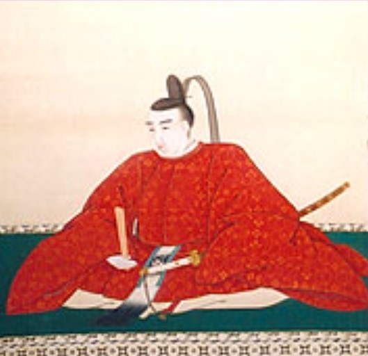 前田直時の肖像。